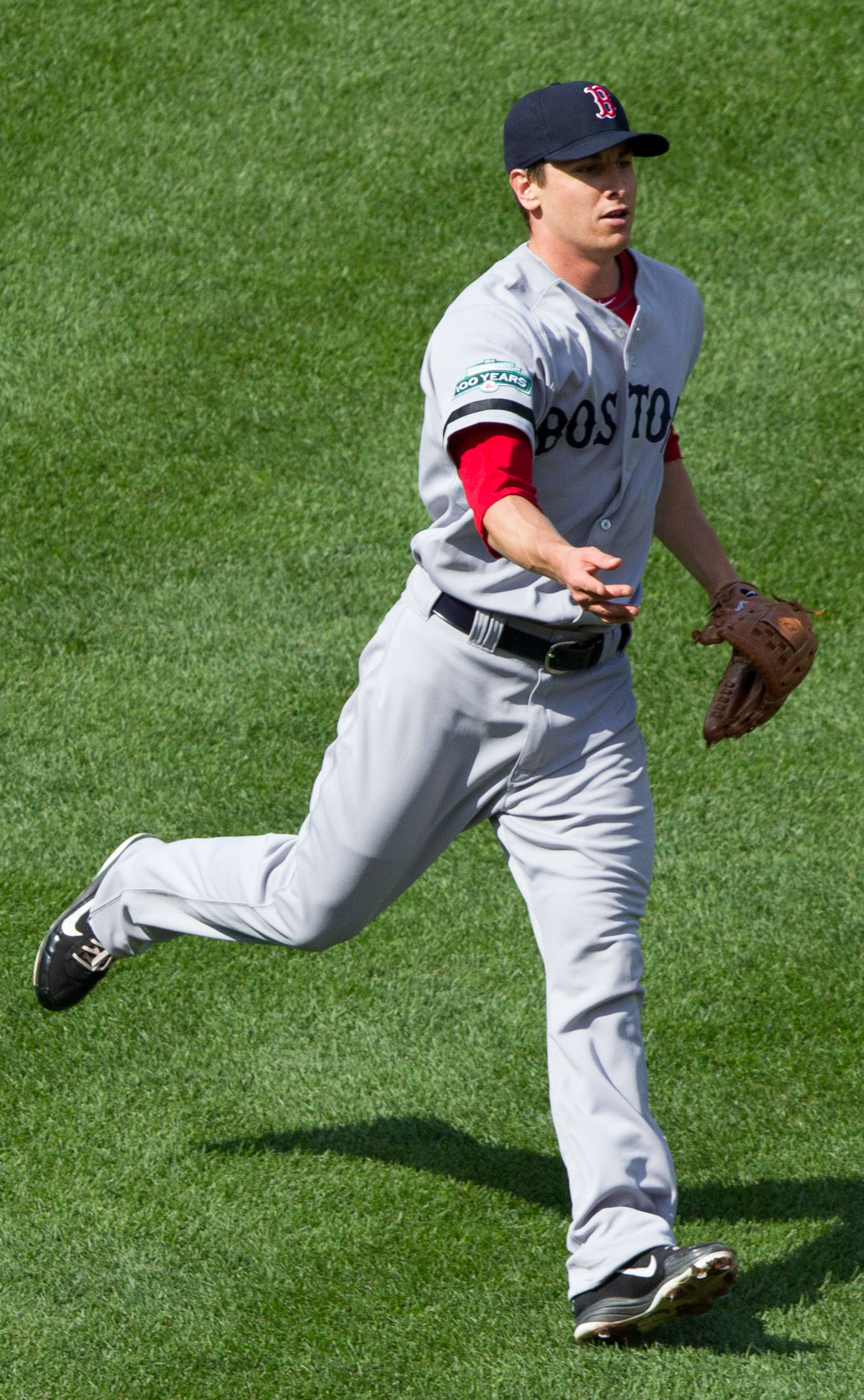 Zach Stewart